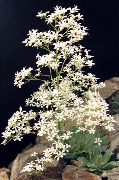 Saxifraga cotyledon var. pyramidalis